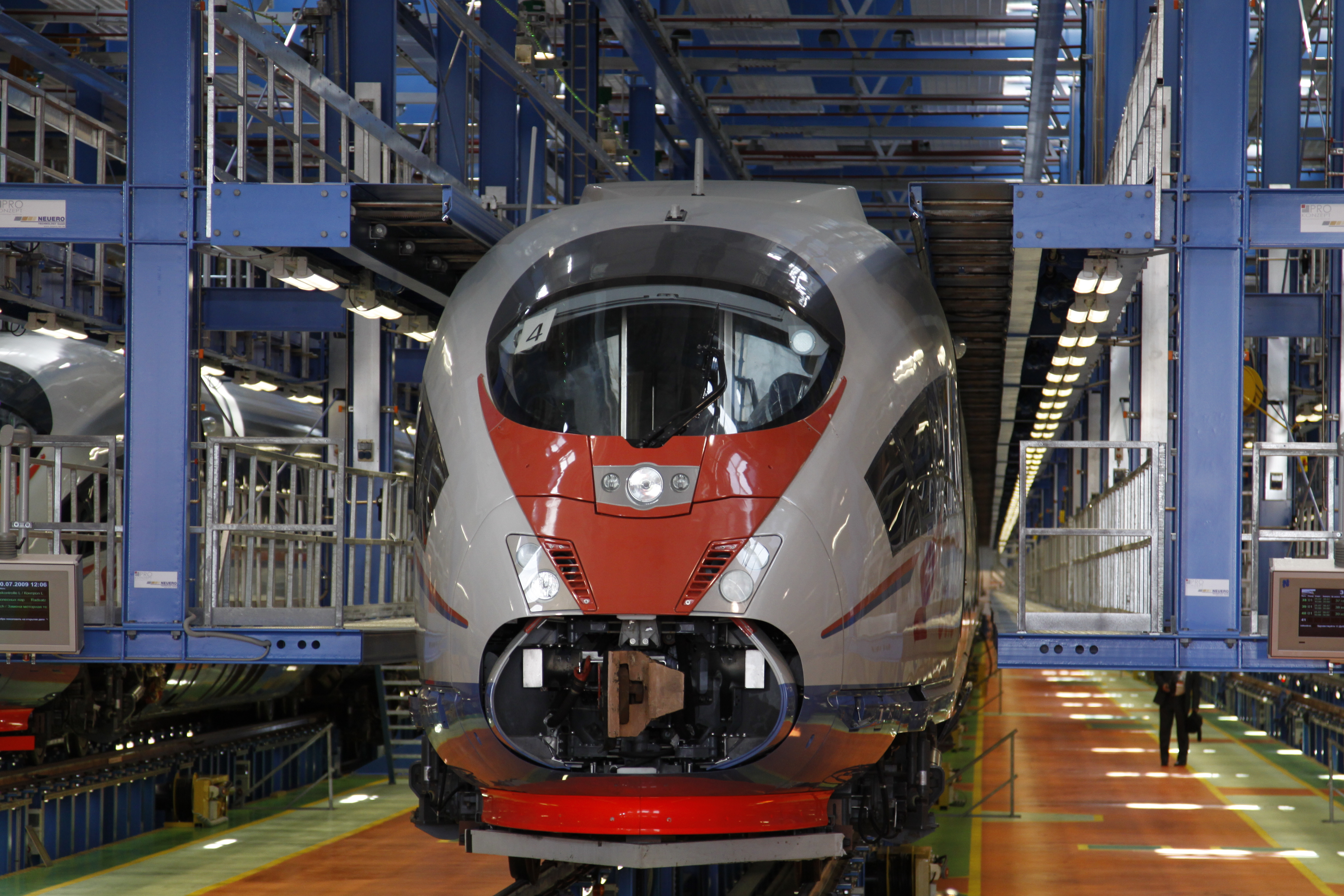 «Сапсан» в новом цехе депо Металлострой.